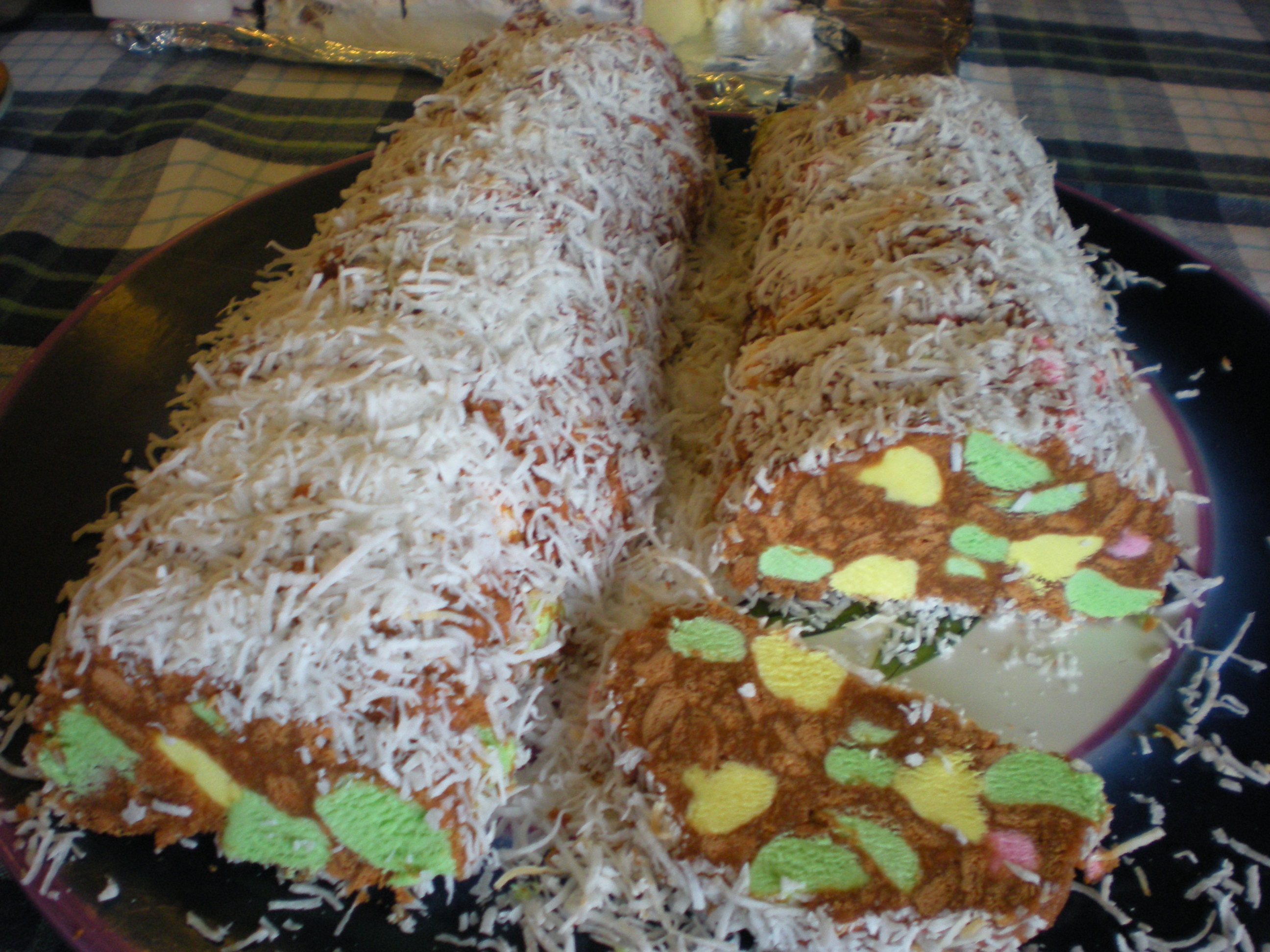 A kiwi kid klassic.